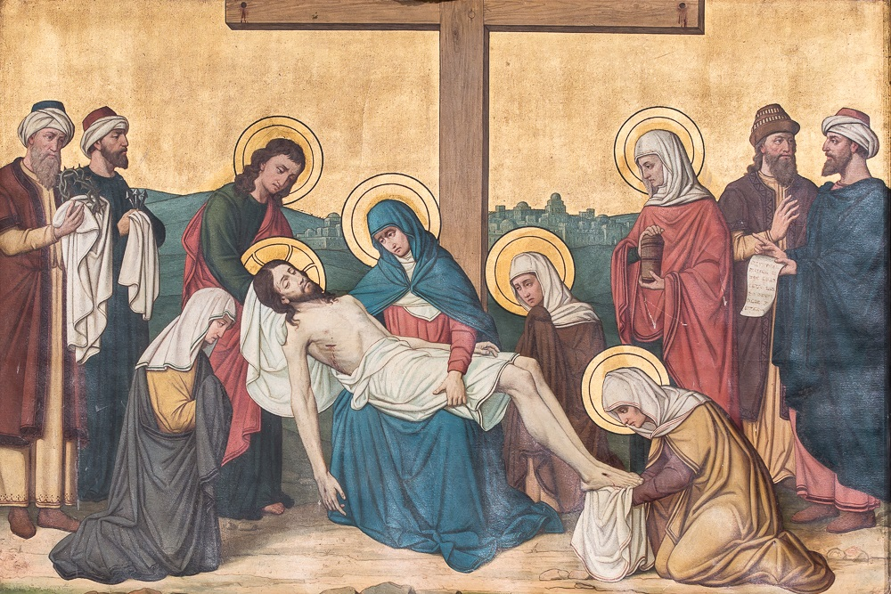 Kruisweg, 13e statie, Christus wordt van het kruis genomen. oil on canvasmedium QS:P186,Q296955;P186,Q12321255,P518,Q861259. Height: 130 cm (51.1 in); Width: 187 cm (73.6 in) dimensions QS:P2048,130U174728;P2049,187U174728 (?). Duivendrecht, Sint-Urbanuskerk.